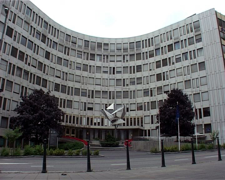 Storebrandbygget i Vika i Oslo med skulpturen Fuglen.